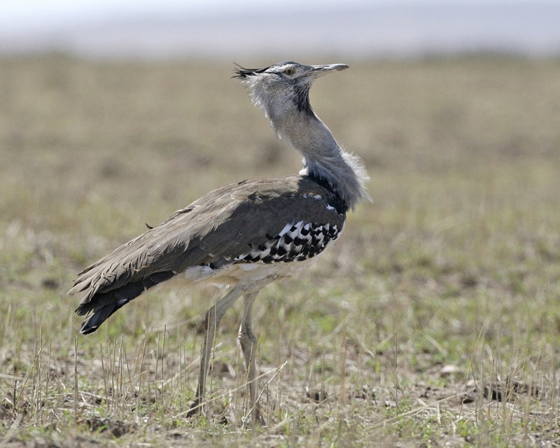 Kori Bustard Ardeotis kori Masai Mara, Kenya 30th. August 2008 690V2282